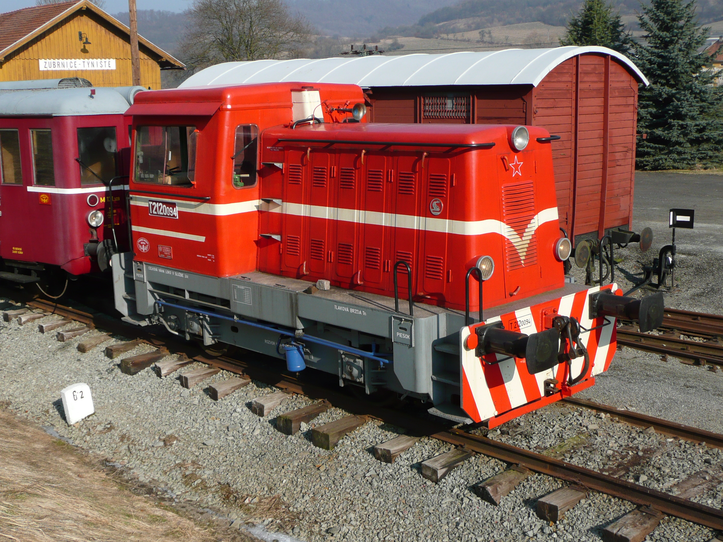 T 212.0094 der Museumsbahn Zubrnice im Zubrnice